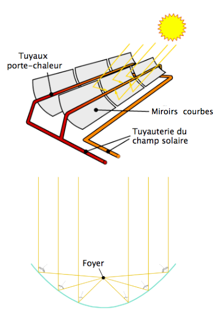 Mécanisme basique d'un champ solaire et ses miroirs creux.